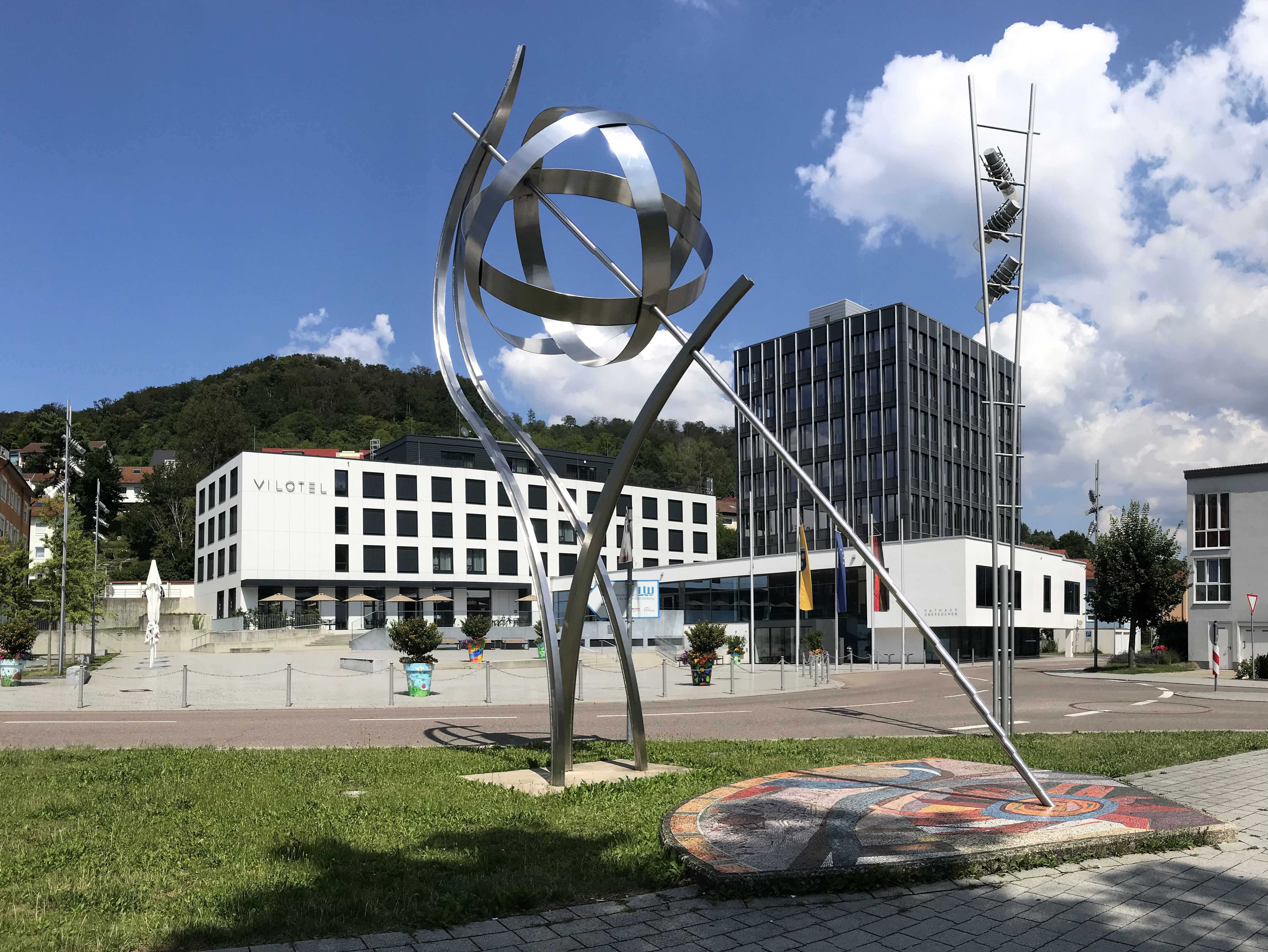 Oberkochen - Eugen-Bolz-Platz mit Rathaus (rechts) und Hotel "Vilotel". Im Vordergrund die 1968 von Ernst Wanner geschaffene und von der Firma Carl Zeiss gespendete Sonnenuhr.